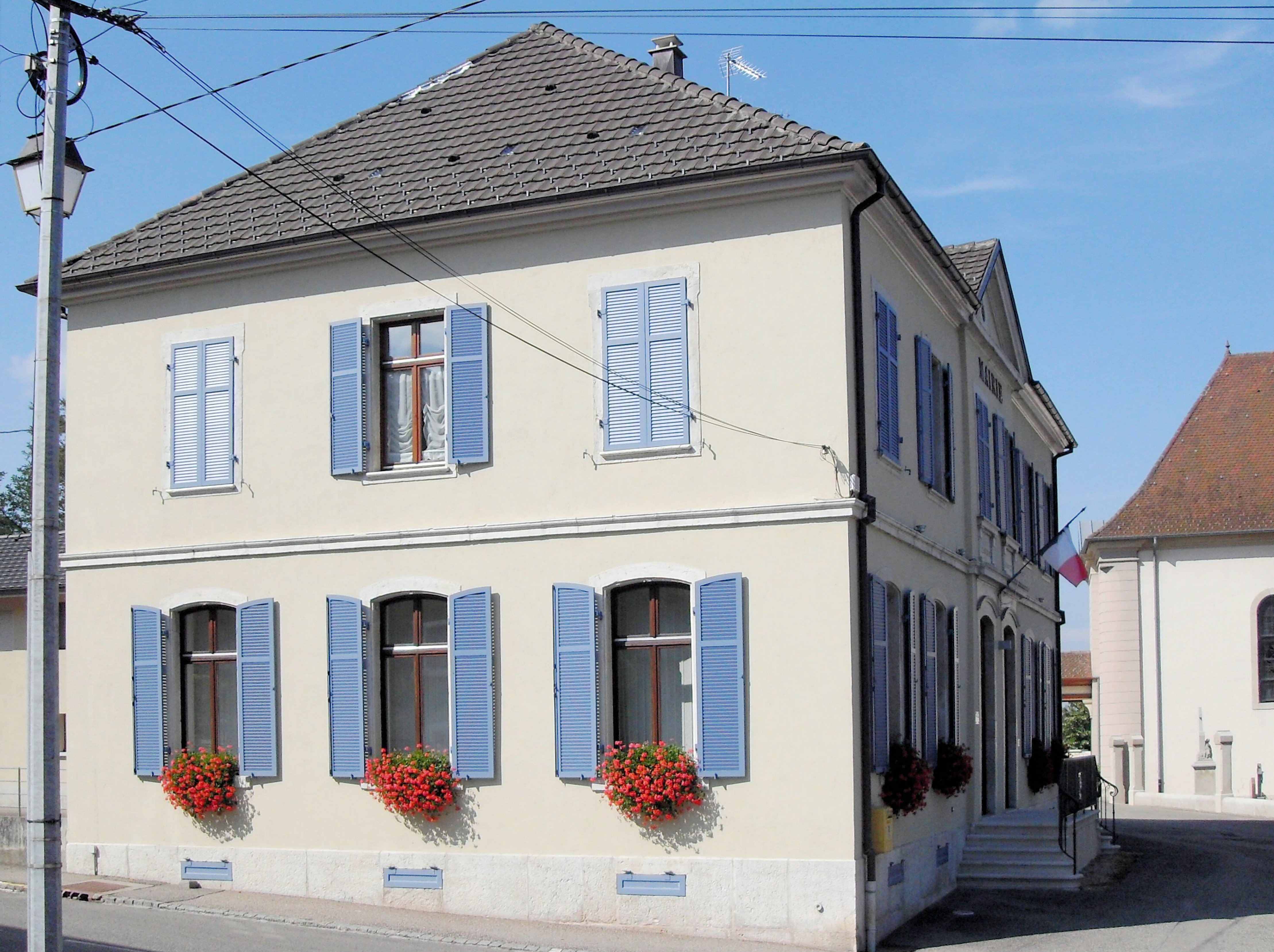 La mairie de Bouxwiller, Haut-Rhin